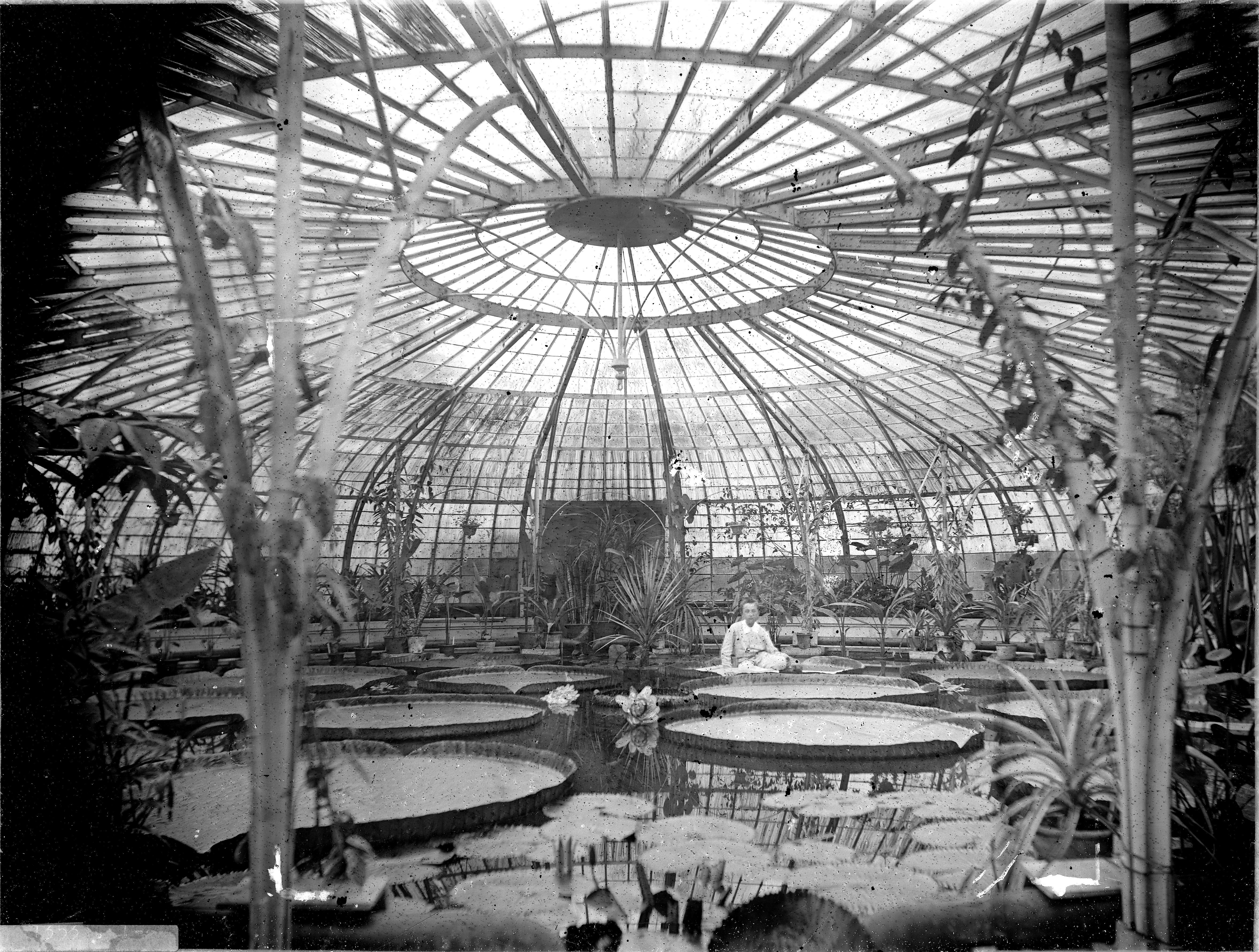 Gezicht in een van de kassen van de Hortus Botanicus, met de waterplant Victoria Regia, in een vijver. Op een van bladeren zit een jongen.